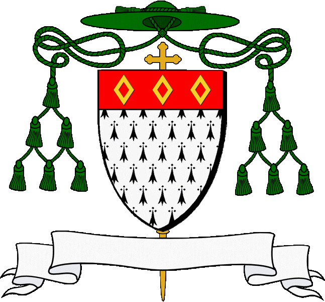 En erminoù, e gab en gwad karget gant teir mailhenn en aour